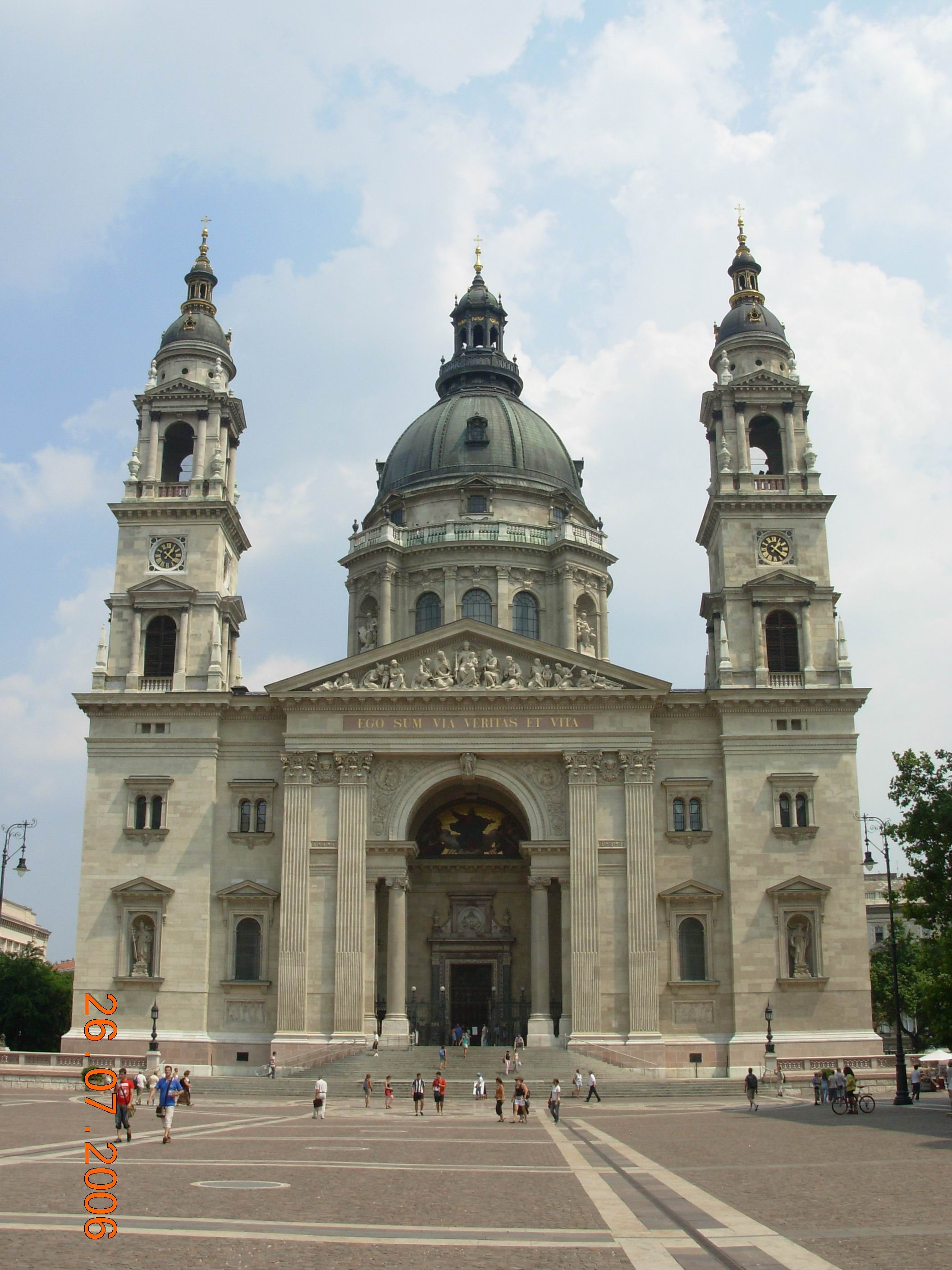 Basilica